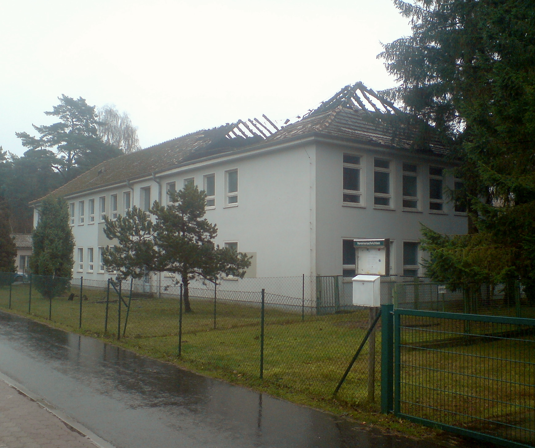 Geplante Flüchtlingsunterkunft in der Trassenheide am Morgen des 15. Novembers 2015. Das ehemalige Verwaltungsgebäude einer Metallbaufirma in der Strandstraße brannte in der vorausgehenden Nacht bei einem Brandanschlag durch Unbekannte aus. Hier sollten in den kommenden Wochen 15 Flüchtlinge in vier für diesen Zweck hergerichteten Wohnungen unterkommen.